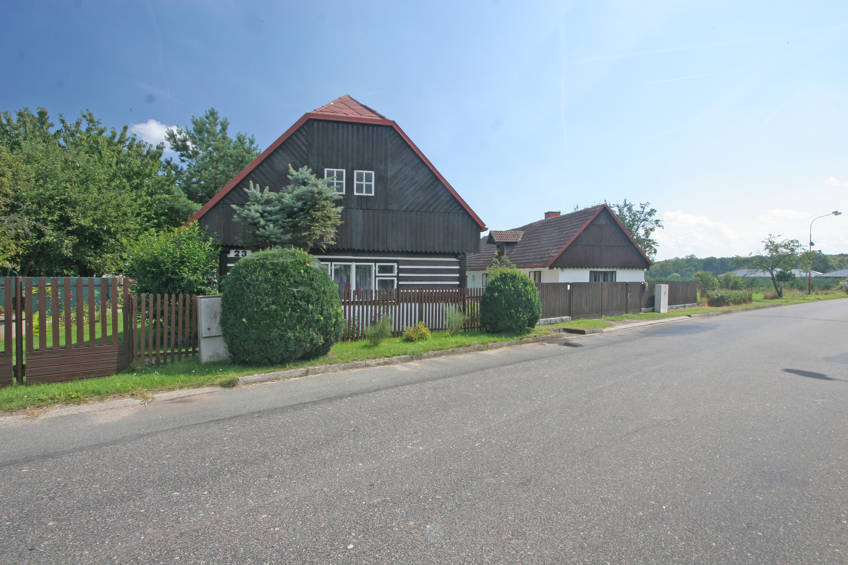 Kolesa čp. 23